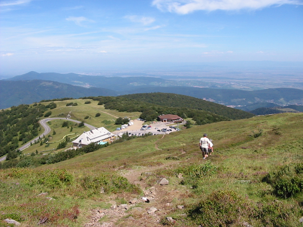 Vue plongeante sur le col du Grand Ballon (Haut-Rhin)